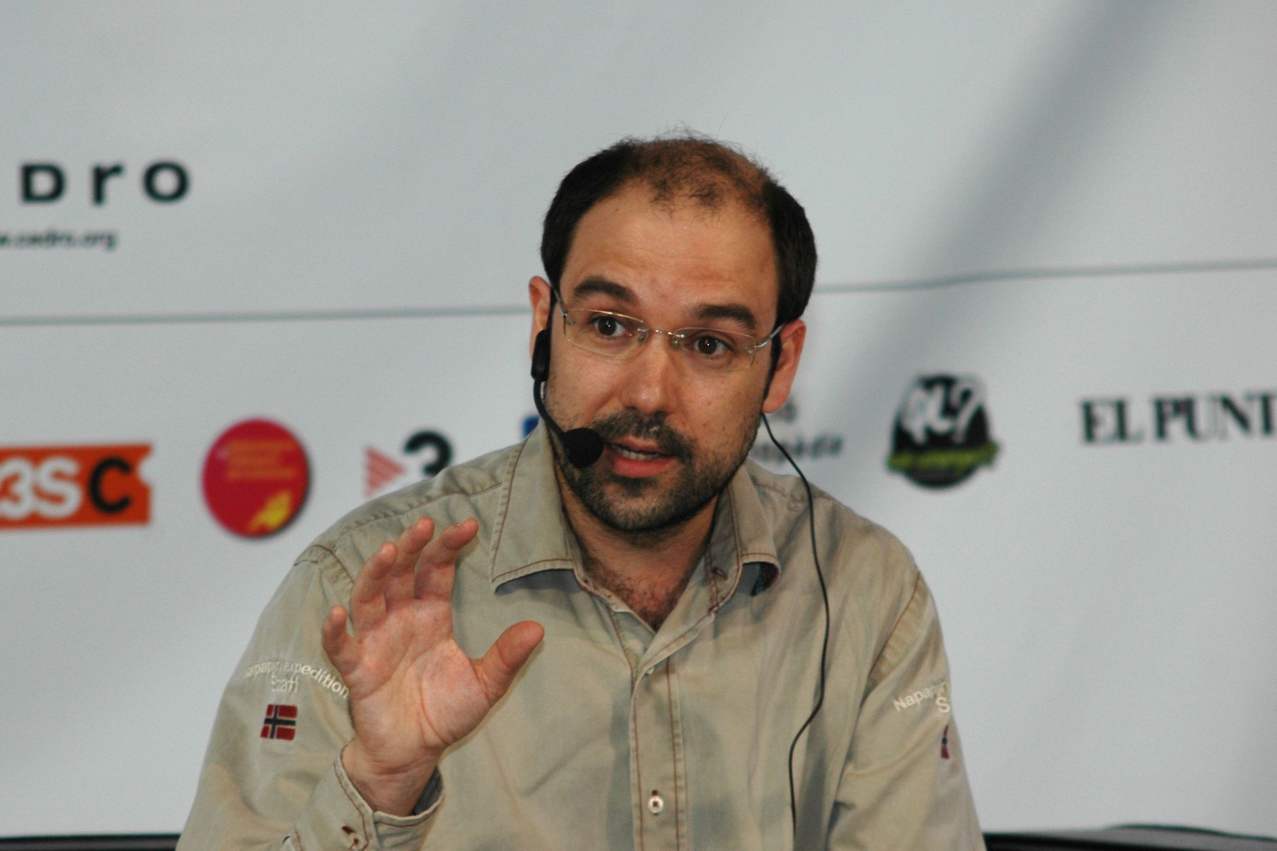 Enric Vila